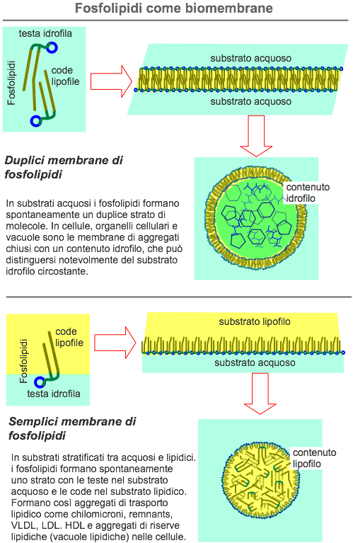 Fosfolipidi come biomembrane Autore: P. Forster Fatto: 30.5.05 .graffle Fonte: inedito